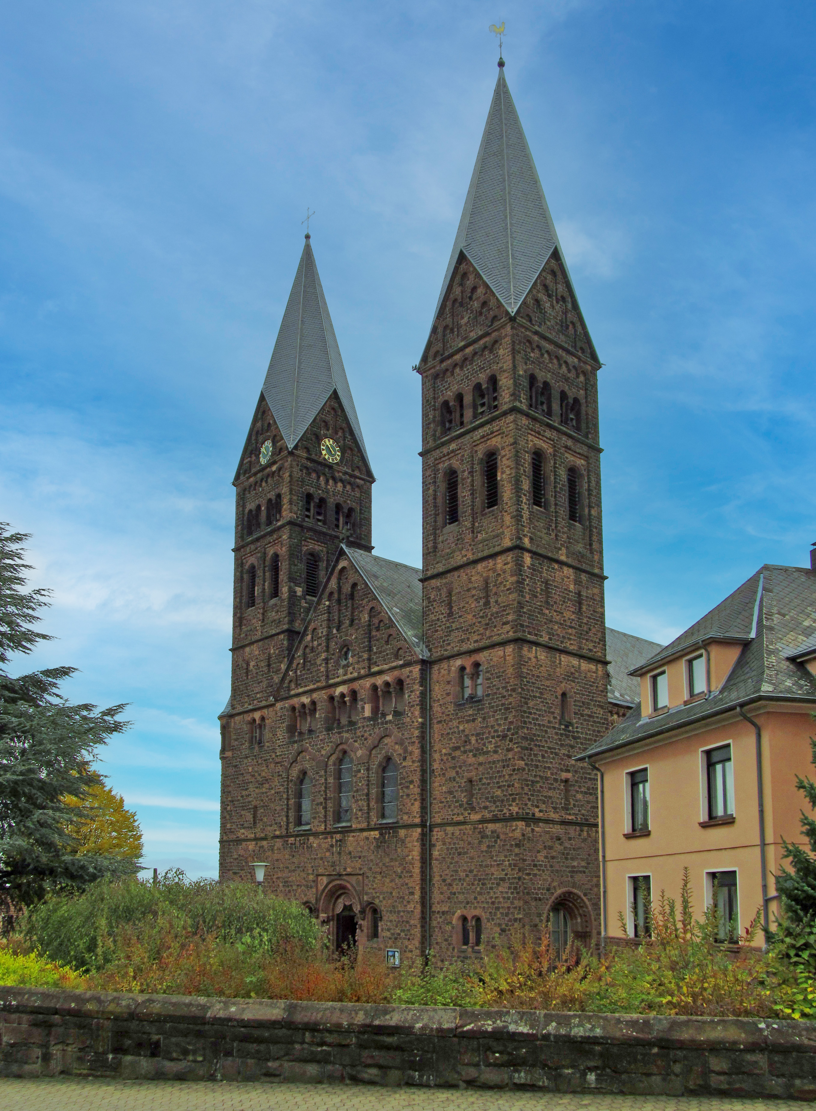 Die katholische Pfarrkirche St. Sebastian in Püttlingen, Saarland